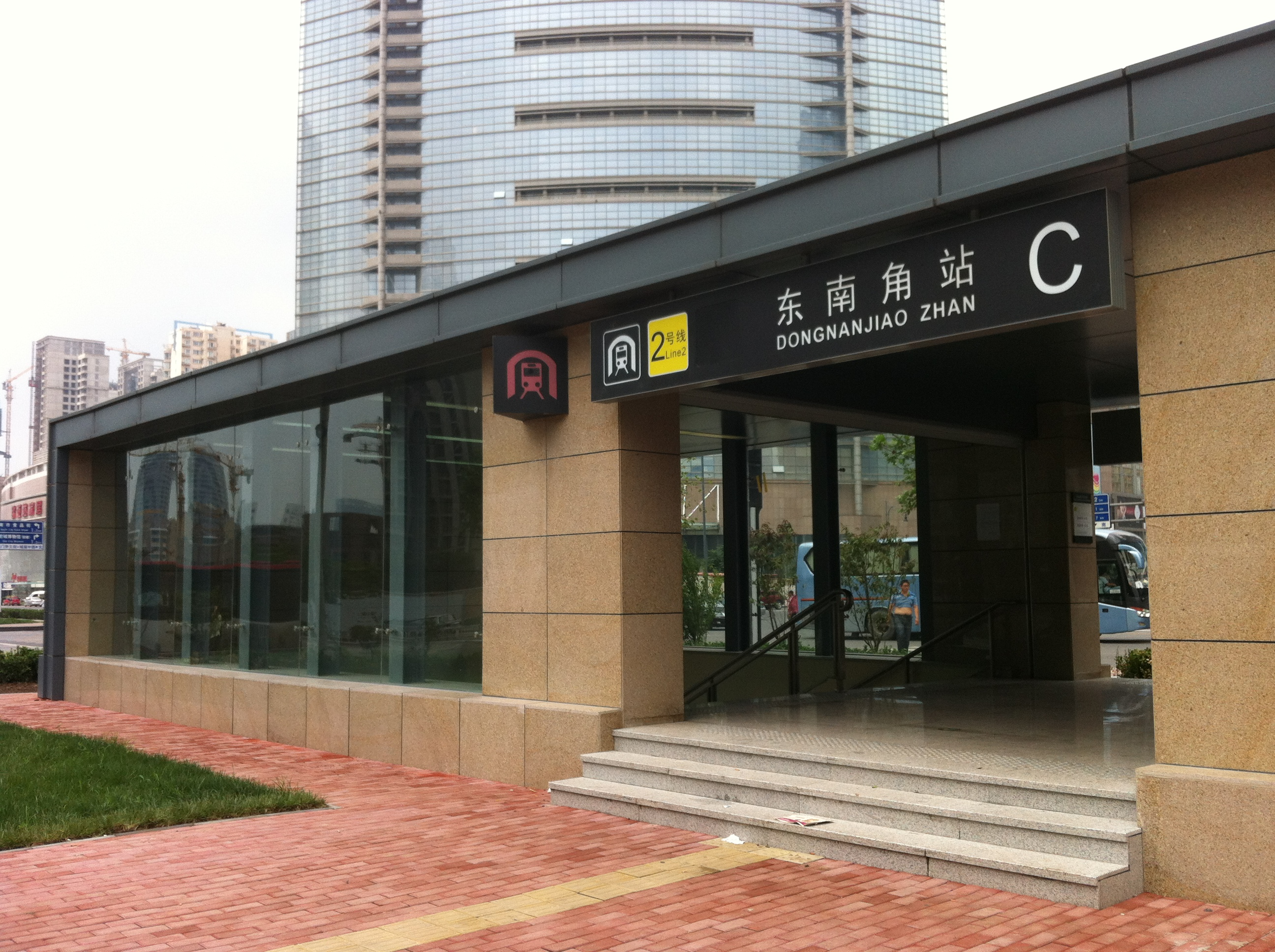 东南角站C口